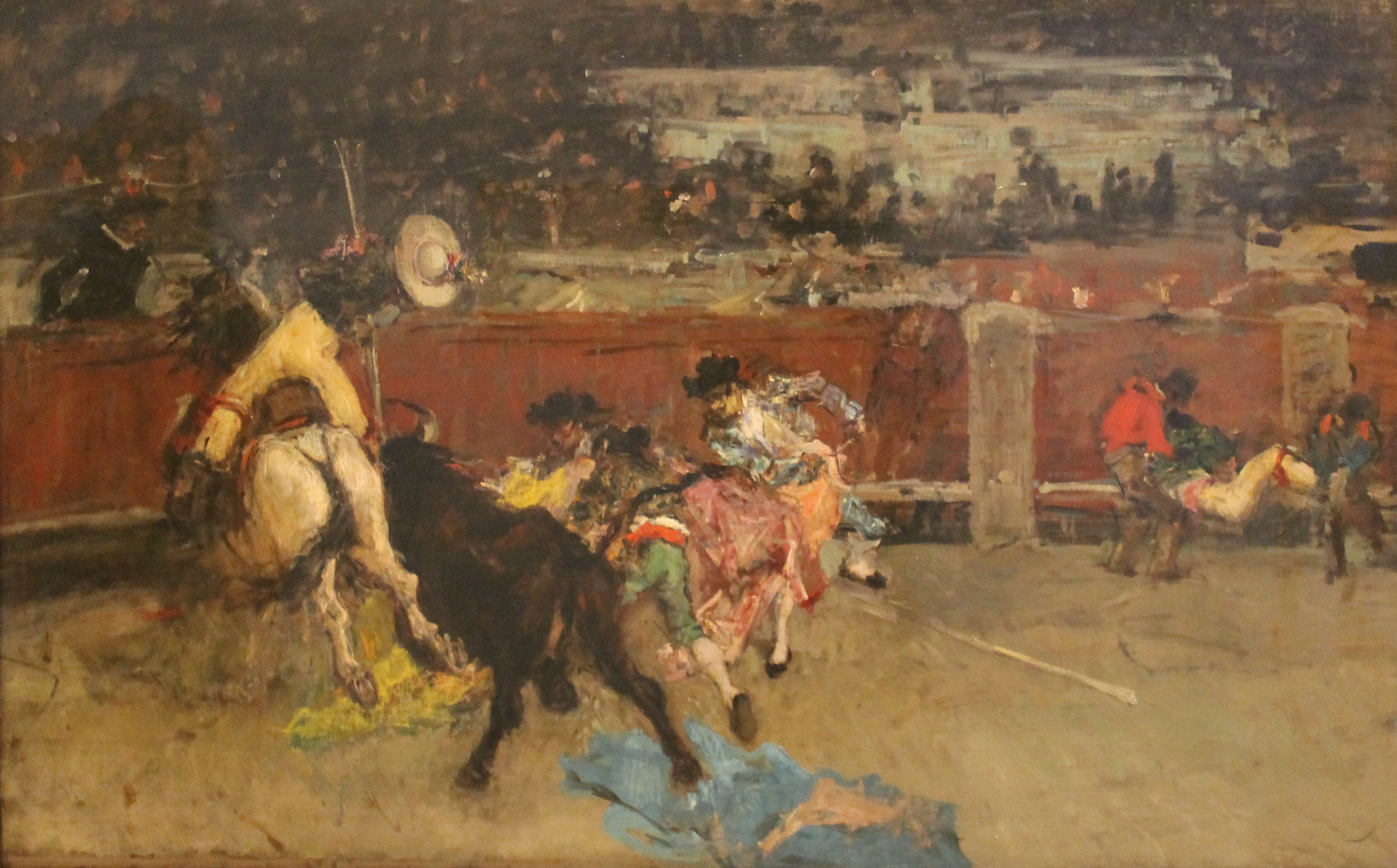 Corrida de toros. Picador herido (c. 1867), por Mariano Fortuny Marsal. Óleo sobre lienzo pegado a aluminio. Museo Carmen Thyssen Málaga.